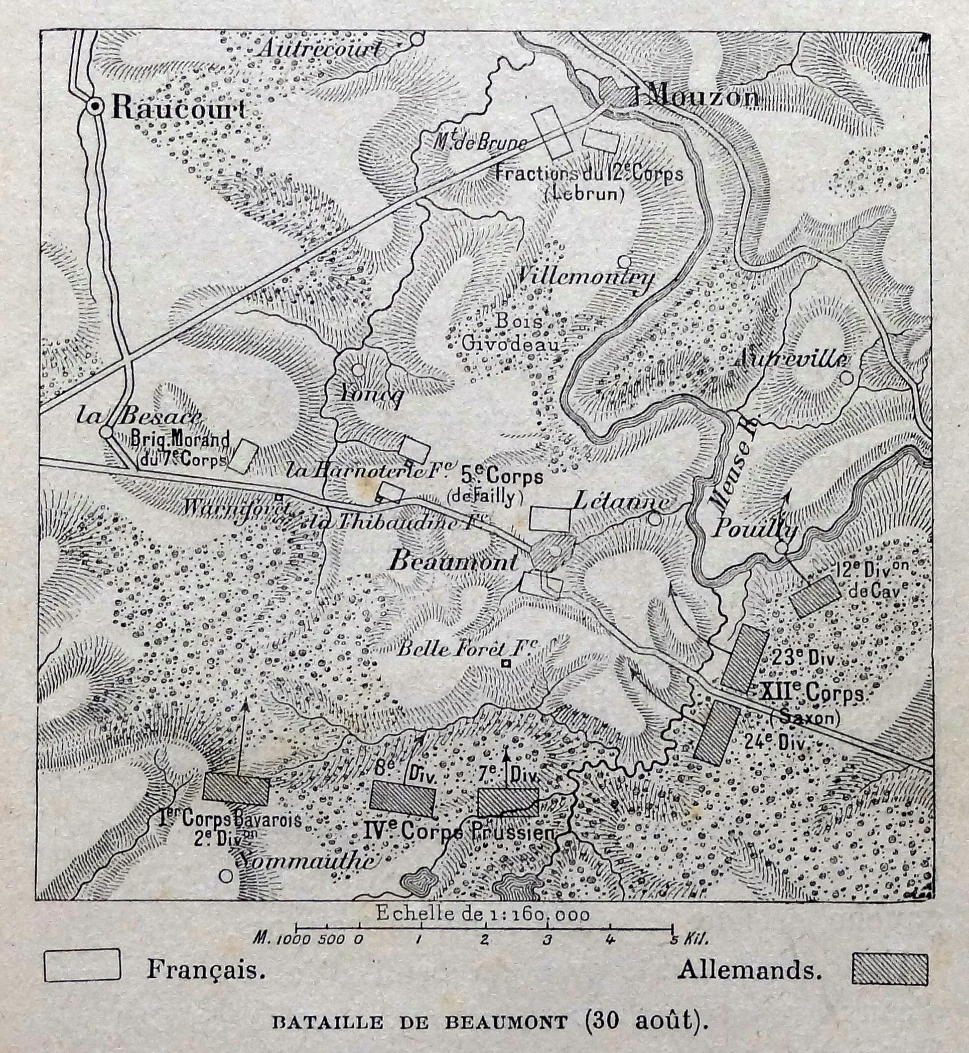 Carte de la bataille de Beaumont le 30 août 1870. D'après l'ouvrage de Paul et Victor Margueritte, Histoire de la guerre de 1870-71, page 59. Aux éditions Georges Chamerot - 1903